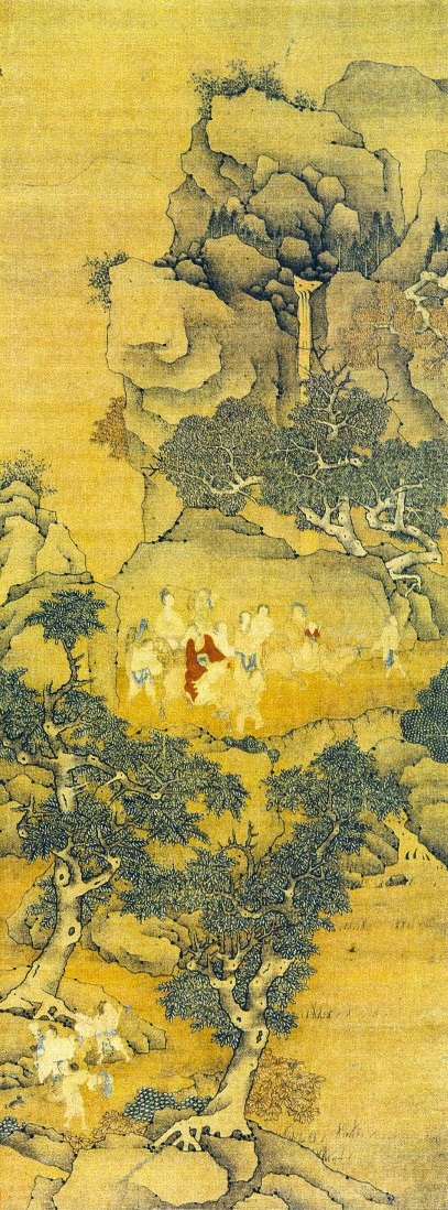 Xu Zhengyang déplace sa famille, rouleau mural, encre et couleurs sur soie, 165,6x64,1cm, par le peintre chinois Cui Zizhong, Actif début XVIIe siècle, mort en 1644.